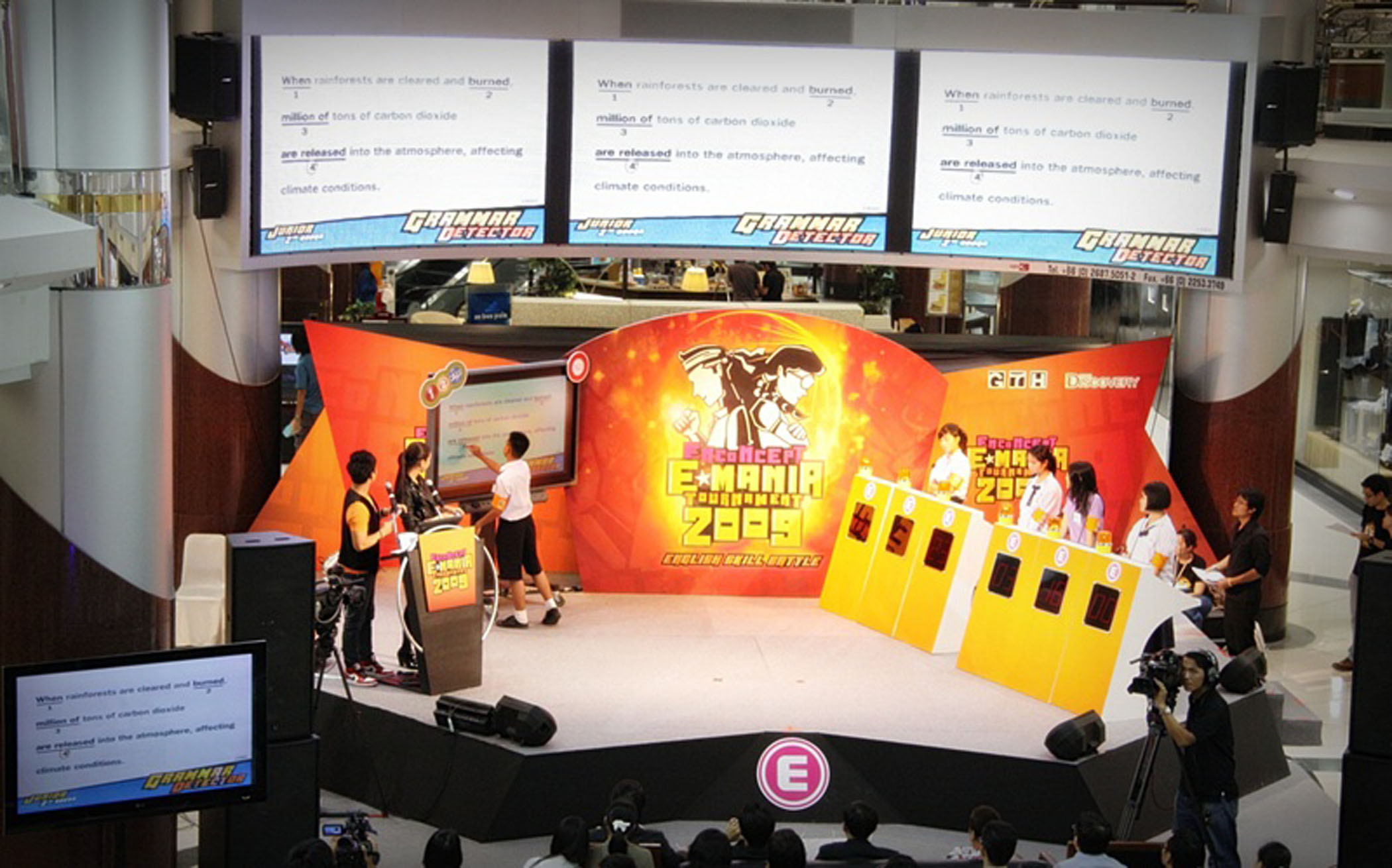 ภาพกิจกรรมการแข่งขันทักษะภาษาอังกฤษของเอ็นคอนเส็ปท์